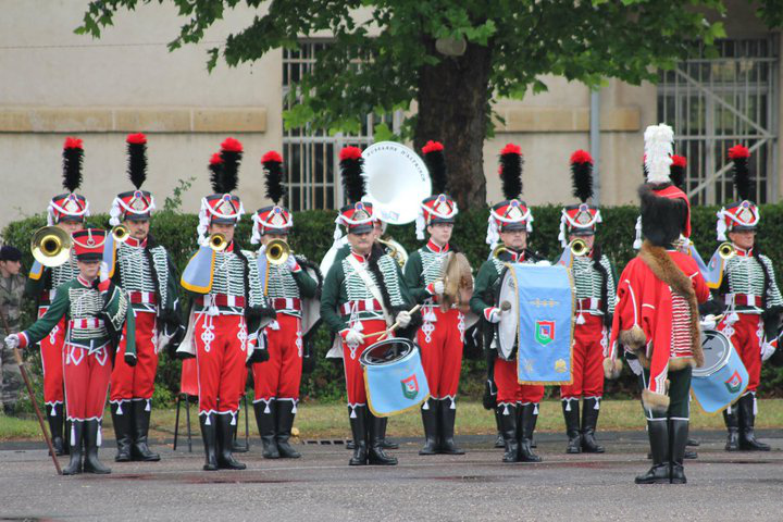 installation 3rh